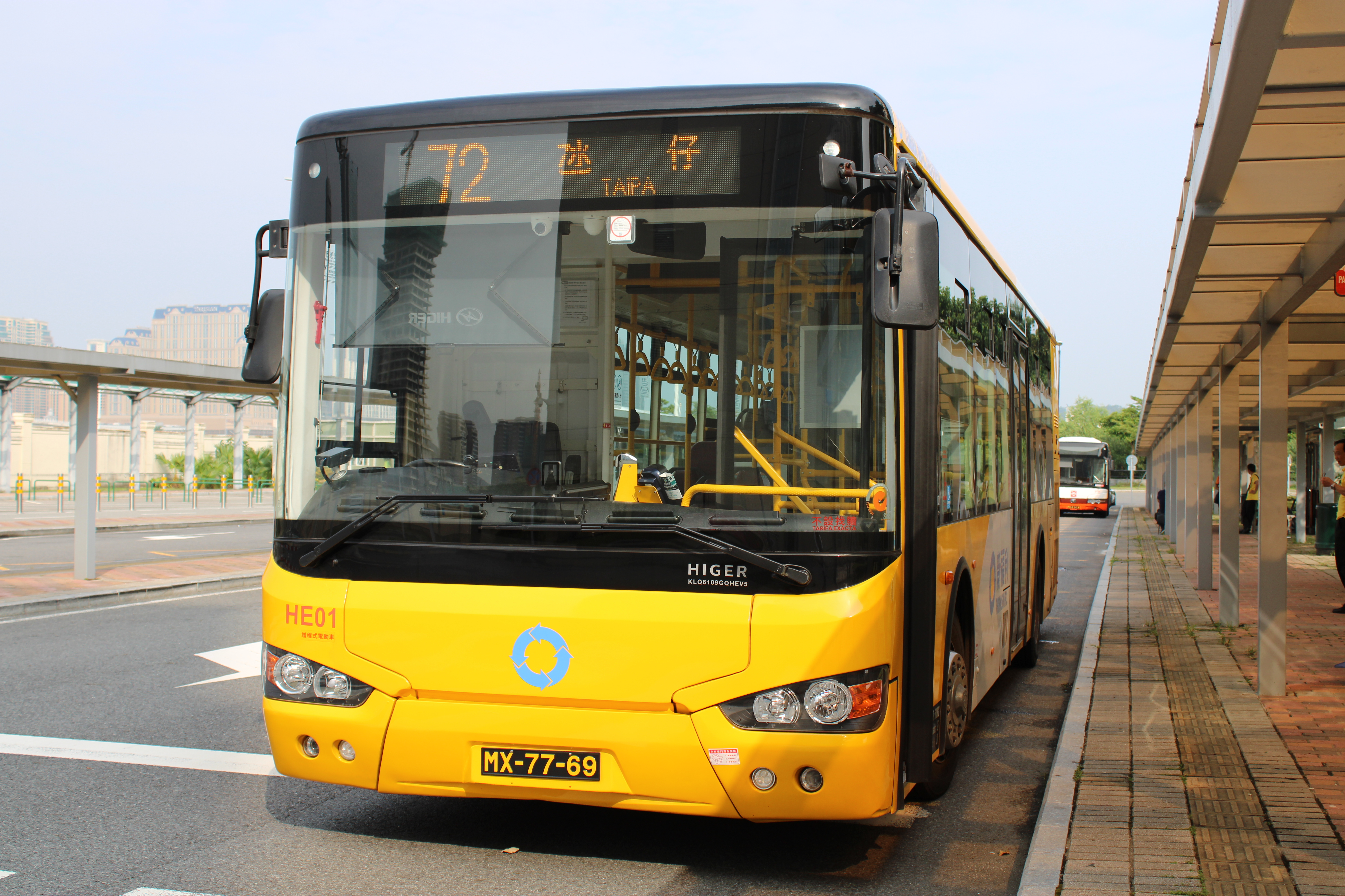 新福利2018年蘇州金龍KLQ6109GQHEV5行駛72路線。